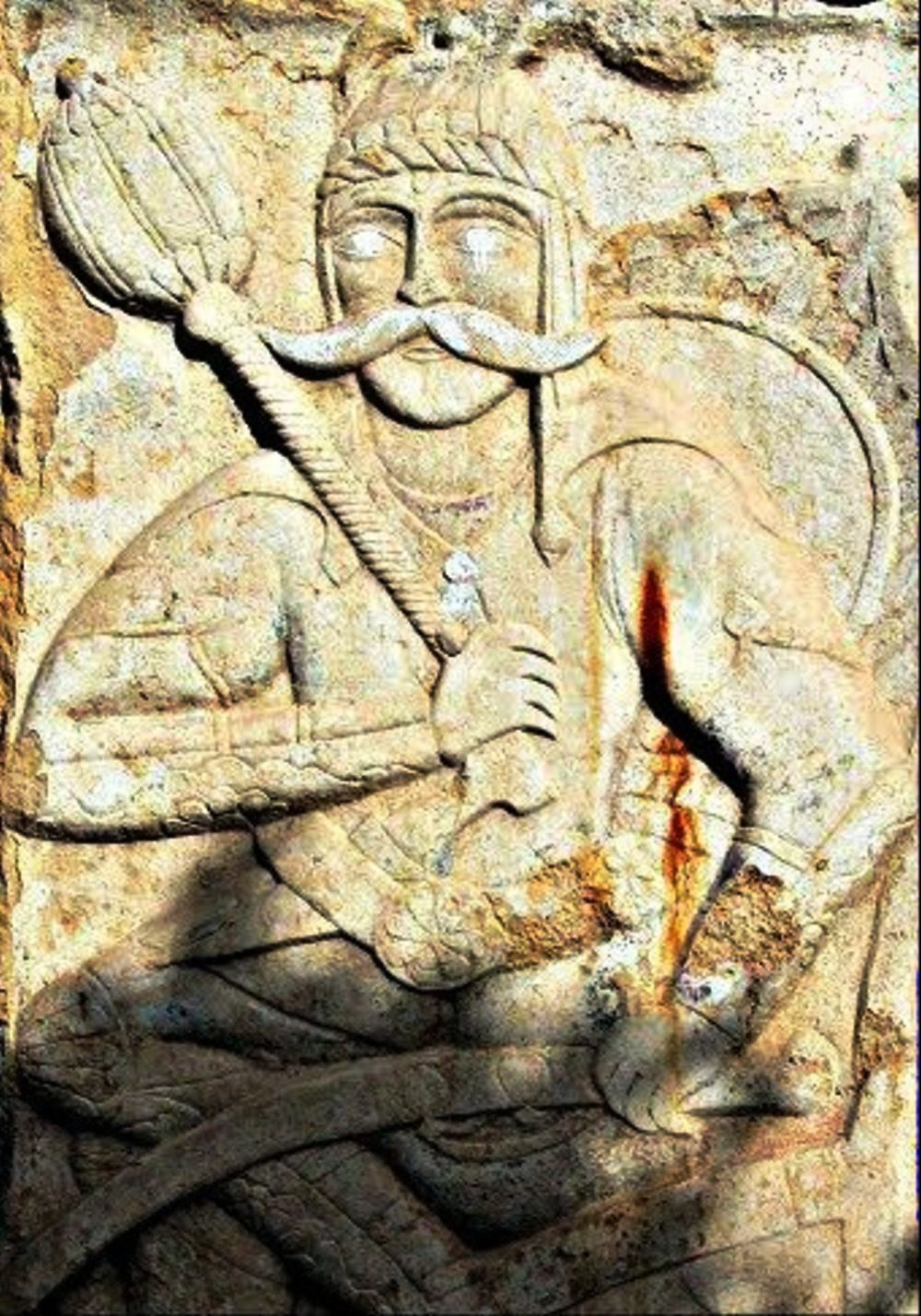 نقش برجسته پهلوان موسی خمیس گرزدین وند